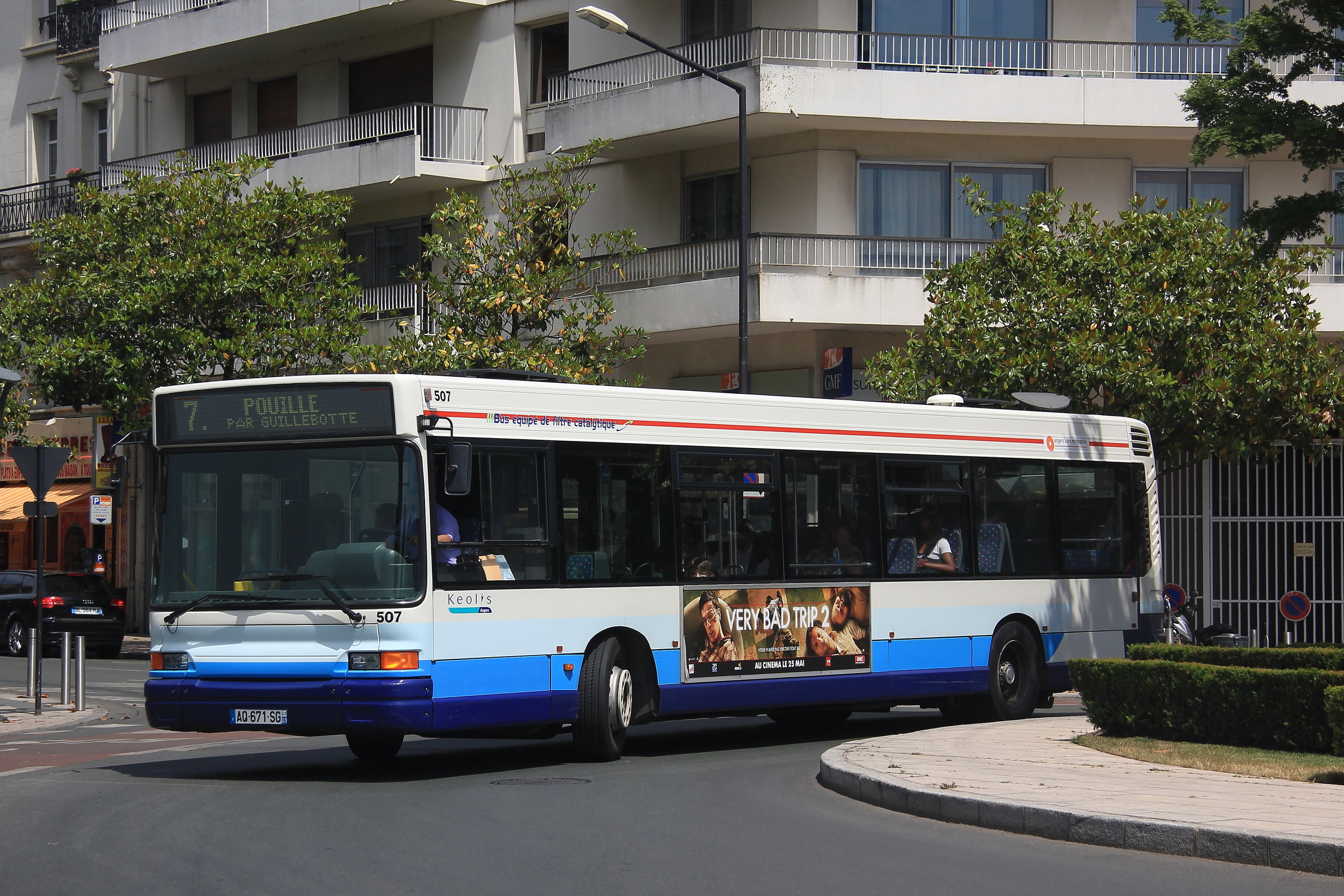 Bus GX317 n°507 en livrée bleue COTRA, place de la Gare à Angers